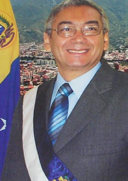 Léster Rodríguez, alcalde del Municipio Libertador en Mérida, Venezuela.